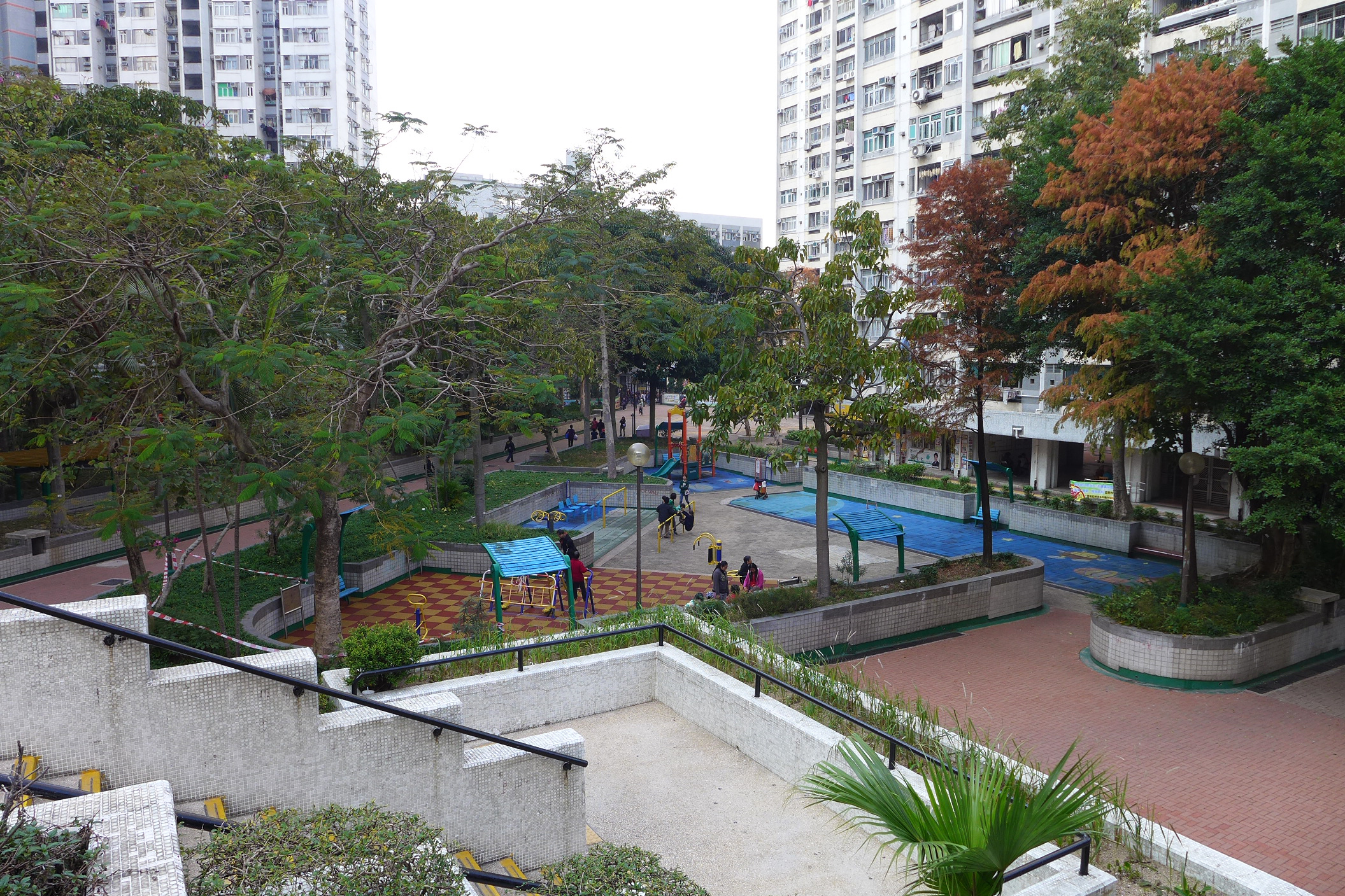 Long Ping Estate Playground